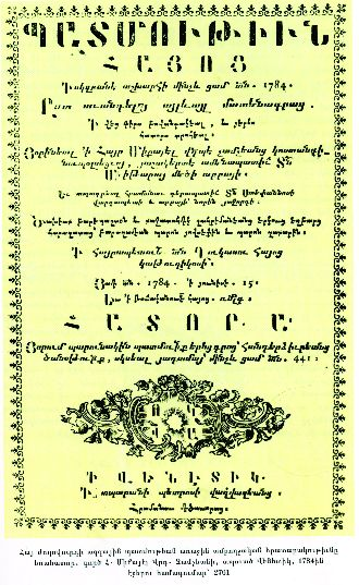 Միքայել Չամչյանի «Պատմութիւն Հայոց» աշխատության տիտղոսաթերթը